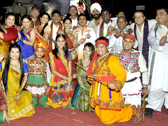 Starcast of 'Taarak Mehta Ka Ooltah Chashmah' visits Sankalp Dandiya. (from left to right standing) Ambika Ranjankar, Sonalika Joshi, Amit Bhatt, Neha Mehta, Shailesh Lodha, Disha Vakani, Shyam Pathak, Dilip Doshi, Gurucharan Singh, Tanuj Mahashabde, Sharad Sankla, Mandar Chandwadkar, Azad Kavi. (from left to right sitting)Jennifer Mistry Bansiwal, Samay Shah, Jheel Mehta, Munmun Dutta, Kush Shah, Azhar Shaikh